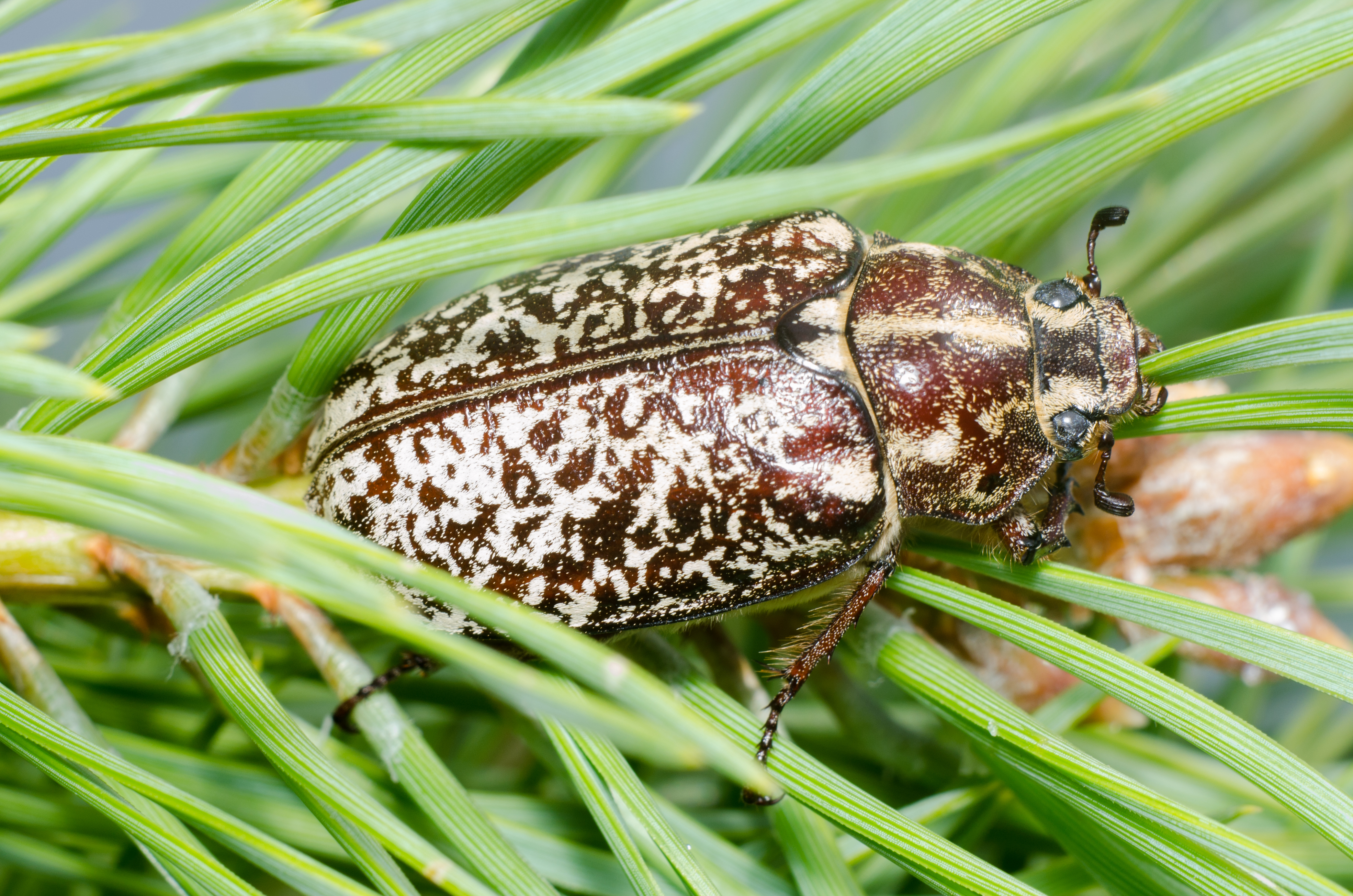 Міжрічинський, міжріччя Дніпра та Десна на території Козелецького та Чернігівського районів